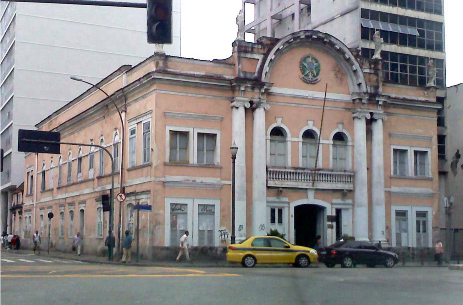 Foto da Casa do Marques do Lavradio (Vice-Rei do Brasil), situada na Rua do Lavradio, na Lapa, cidade do Rio de Janeiro, feita pelo usuário com a câmera do celular LG KF510c.